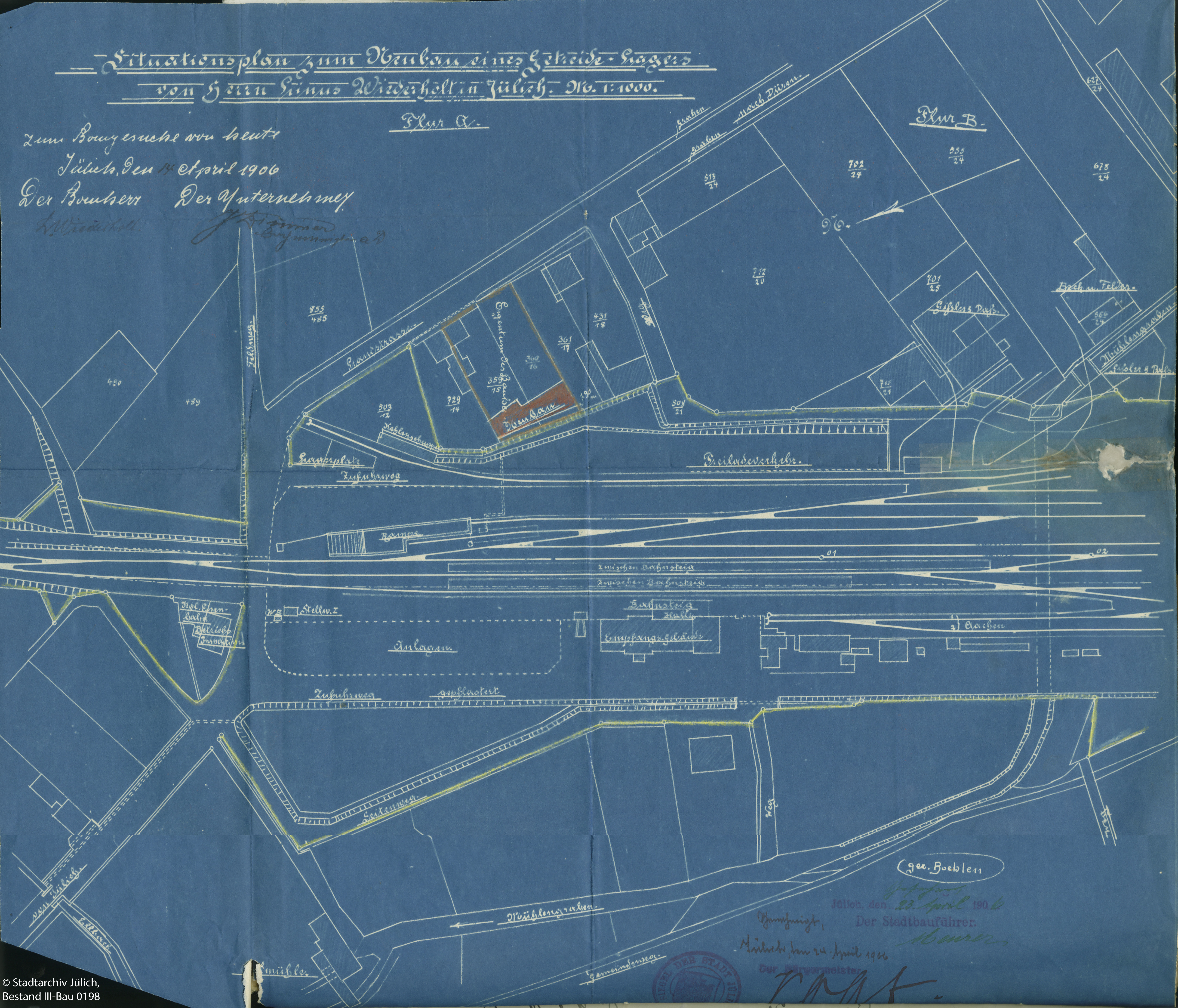 Scan des Stadtarchivs Jülich einer historischen Bauakte aus dem Bestand "III-Bau" (Nr. 0198), im Findbuch verzeichnet als "Situationsplan zum Neubau eines Getreide-Lagers 1906 mit Zeichnung der Bahnanlagen". Der Plan zeigt den Zustand des Jülicher Bahnhofs vor dem Bau der Strecke nach Linnich/Baal, durch welchen es umfangreiche Erweiterungen der Gleisanlagen gab.